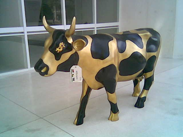 Vaca "Millonaria", parte del Cowparade de la Ciudad de México, presentada de forma temporal en el Tecnológico de Monterrey, Campus Estado de México